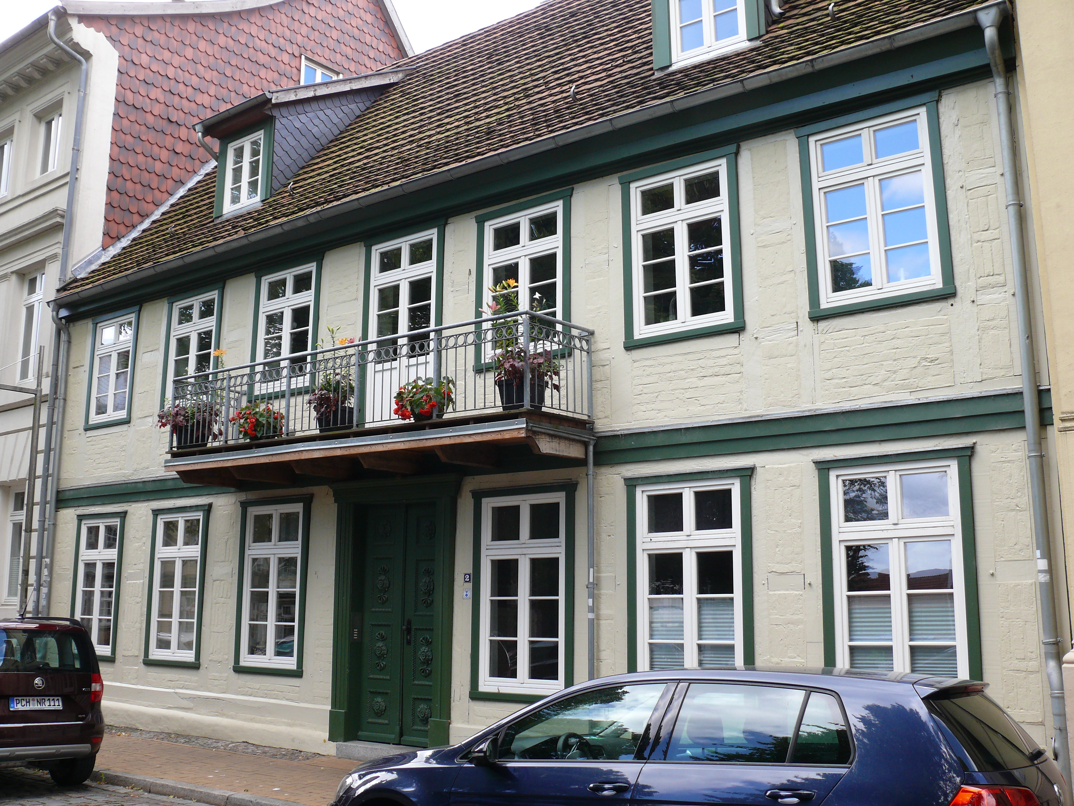 Das Gebäude "Lindenstraße 2" in Schwerin.